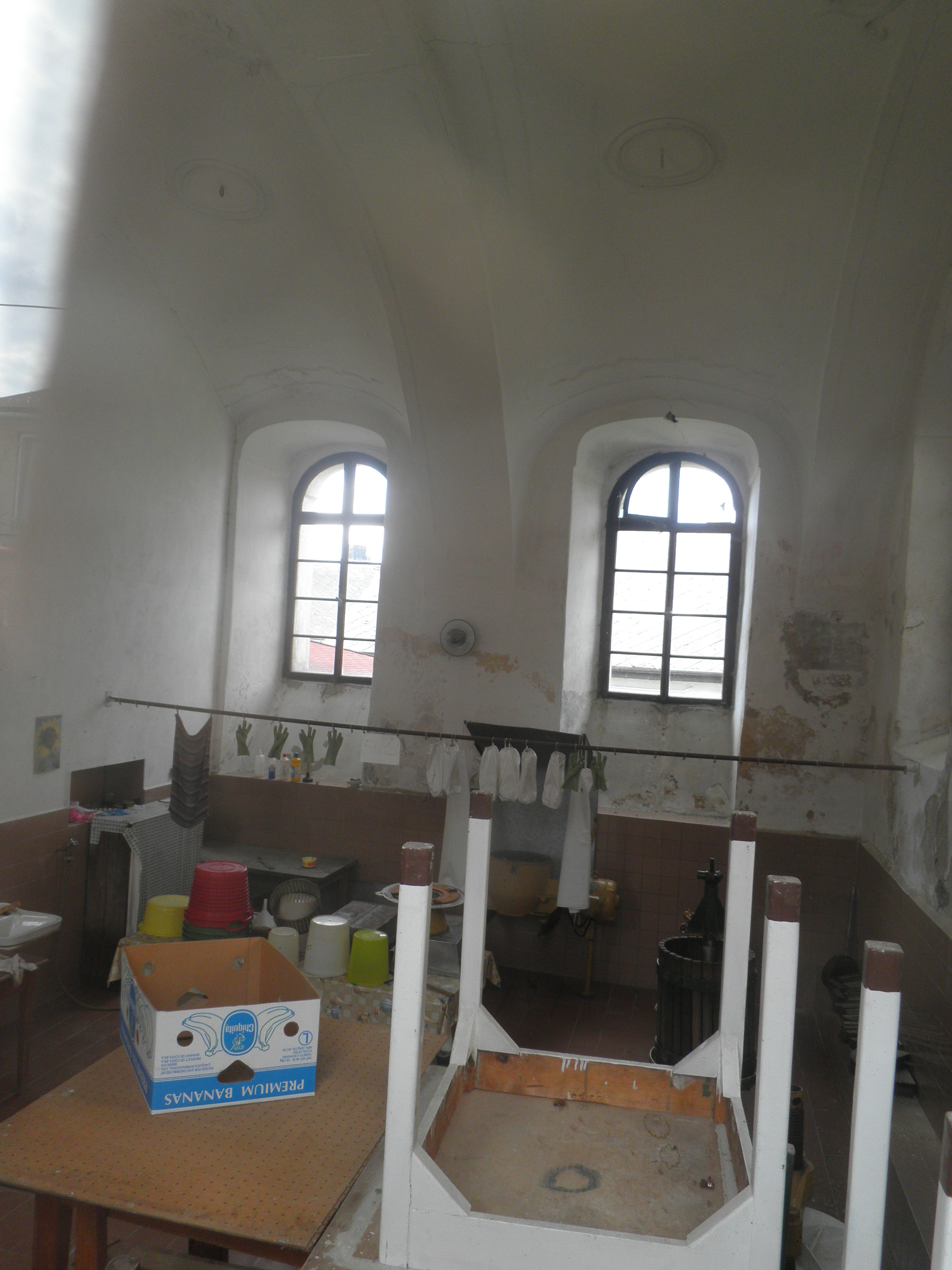 Bývalá synagoga v Batelově neslouží původnímu účelu.